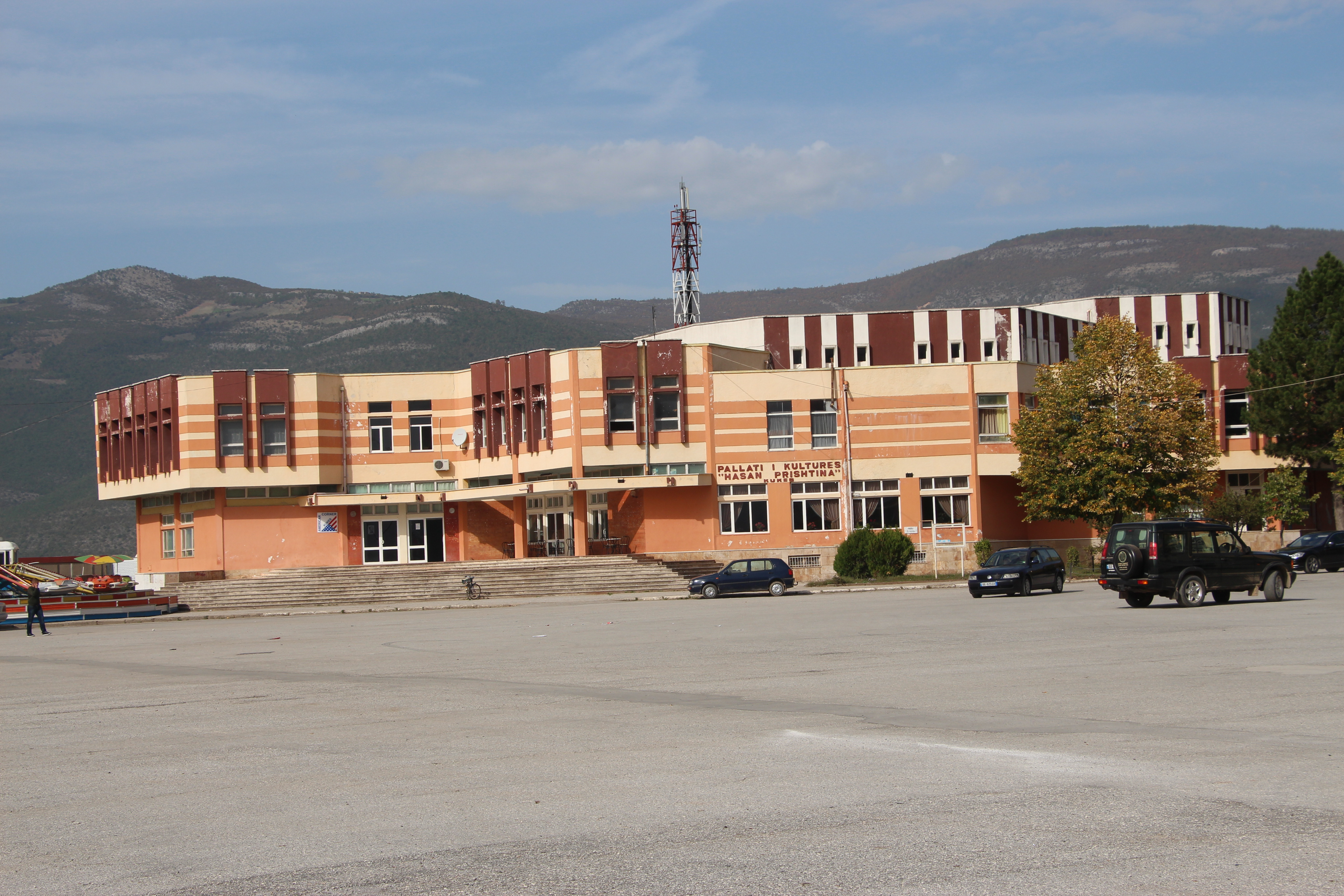 Pallati I kultures "Hasan Prishtina" Kukes